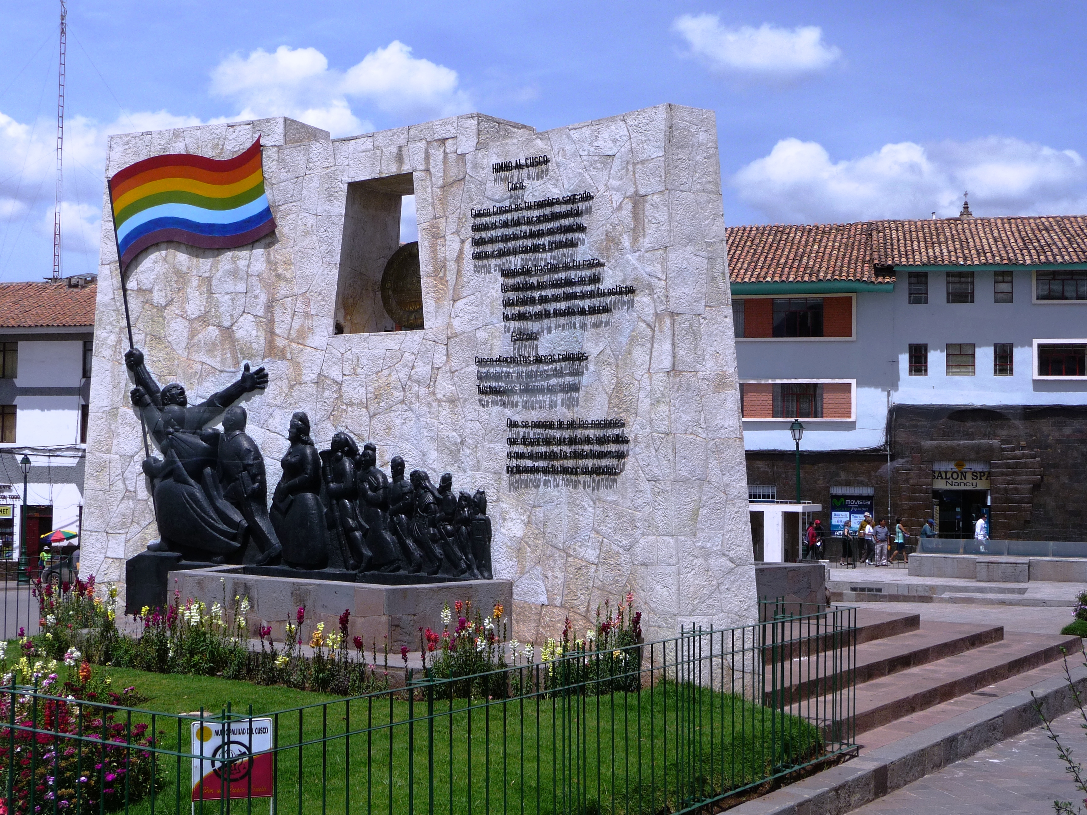 El Ovalo, Cusco, Peru